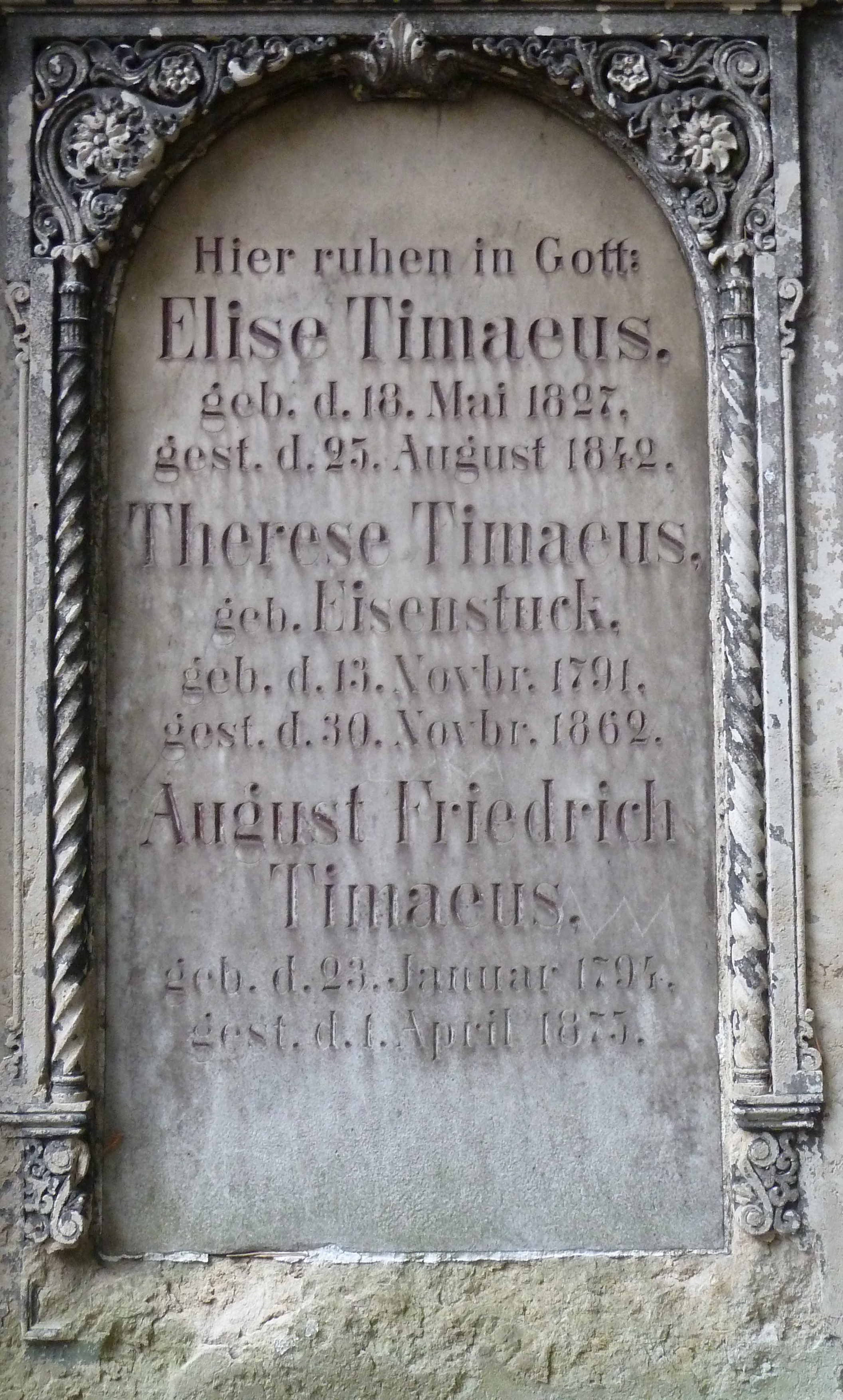 Grabstein von August Friedrich Timaeus auf dem Inneren Neustädter Friedhof (2. Feld, G) in Dresden; Inschrift: Hier ruhen in Gott: Elise Timaeus. geb. d. 18. Mai 1827. gest. d. 25. August 1842. Therese Timaeus. geb. Eisenstuck. geb. d. 13. Novbr. 1791. gest. d. 30. Novbr. 1862. August Friedrich Timaeus. geb. d. 23. Januar 1794. gest. d. 1. April 1875.